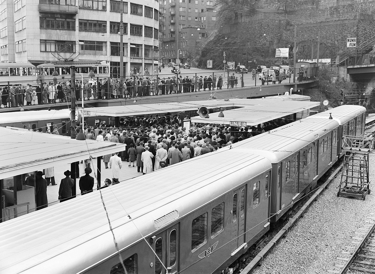 Slussen tunnelbanestation vid invigningen 1 oktober 1950